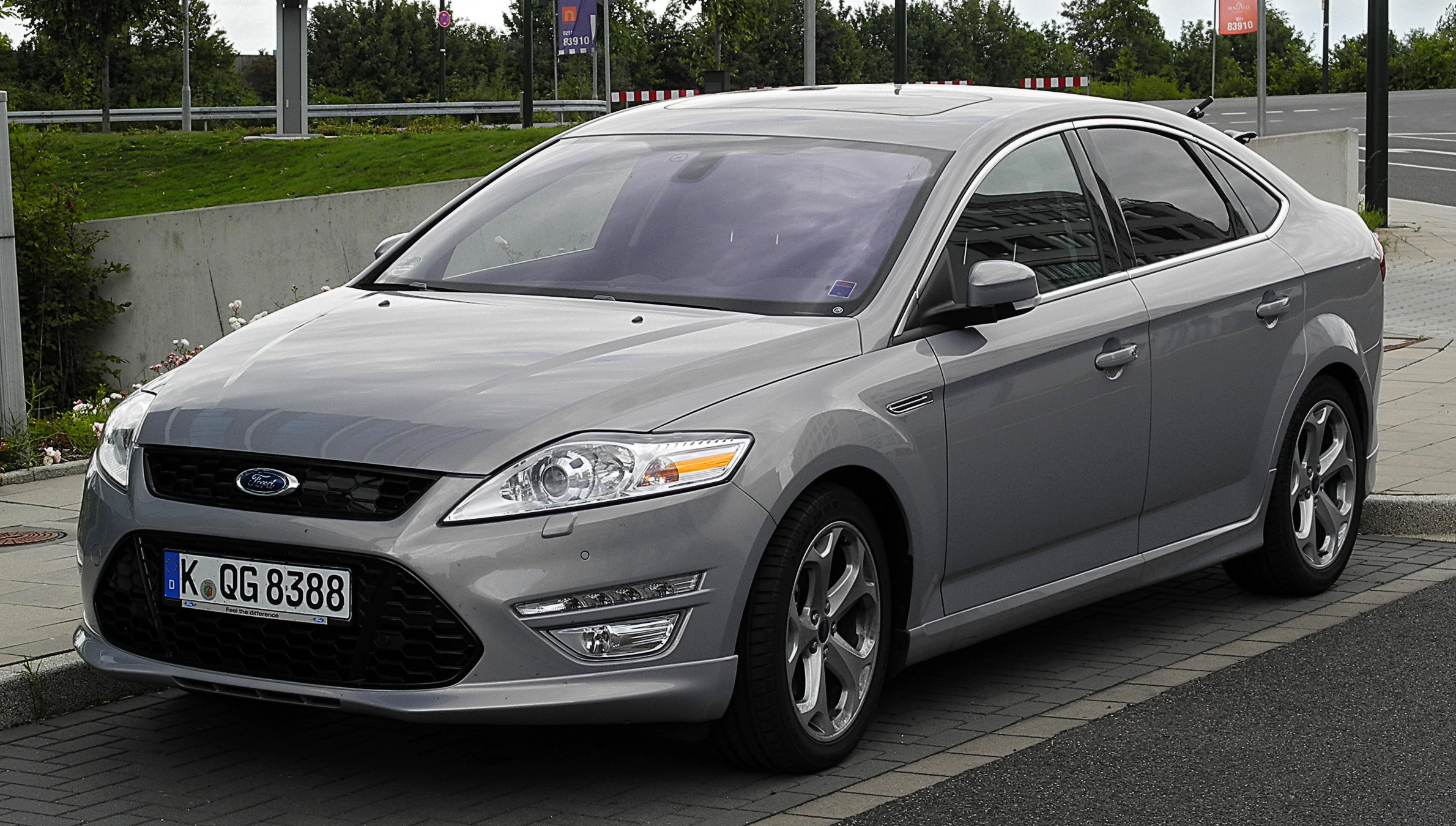 Ford Mondeo Titanium S (BA7, Facelift)